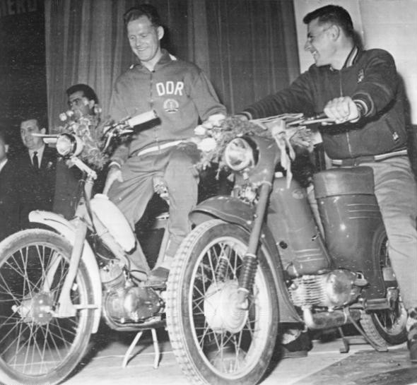 Friedensfahrt, Fahrerehrung, Schur, Covens Zentralbild GTK Ks-Noa 5.5.1960 - XIII. Friedensfahrt 1960 - 2. Etappe. UBz: Der Etappensieger Covens (rechts) (Belgien) und der Zweitplazierte Schur (DDR) auf dem Motorrad bzw. Moped, die sie als Ehrenpreis erhielten.